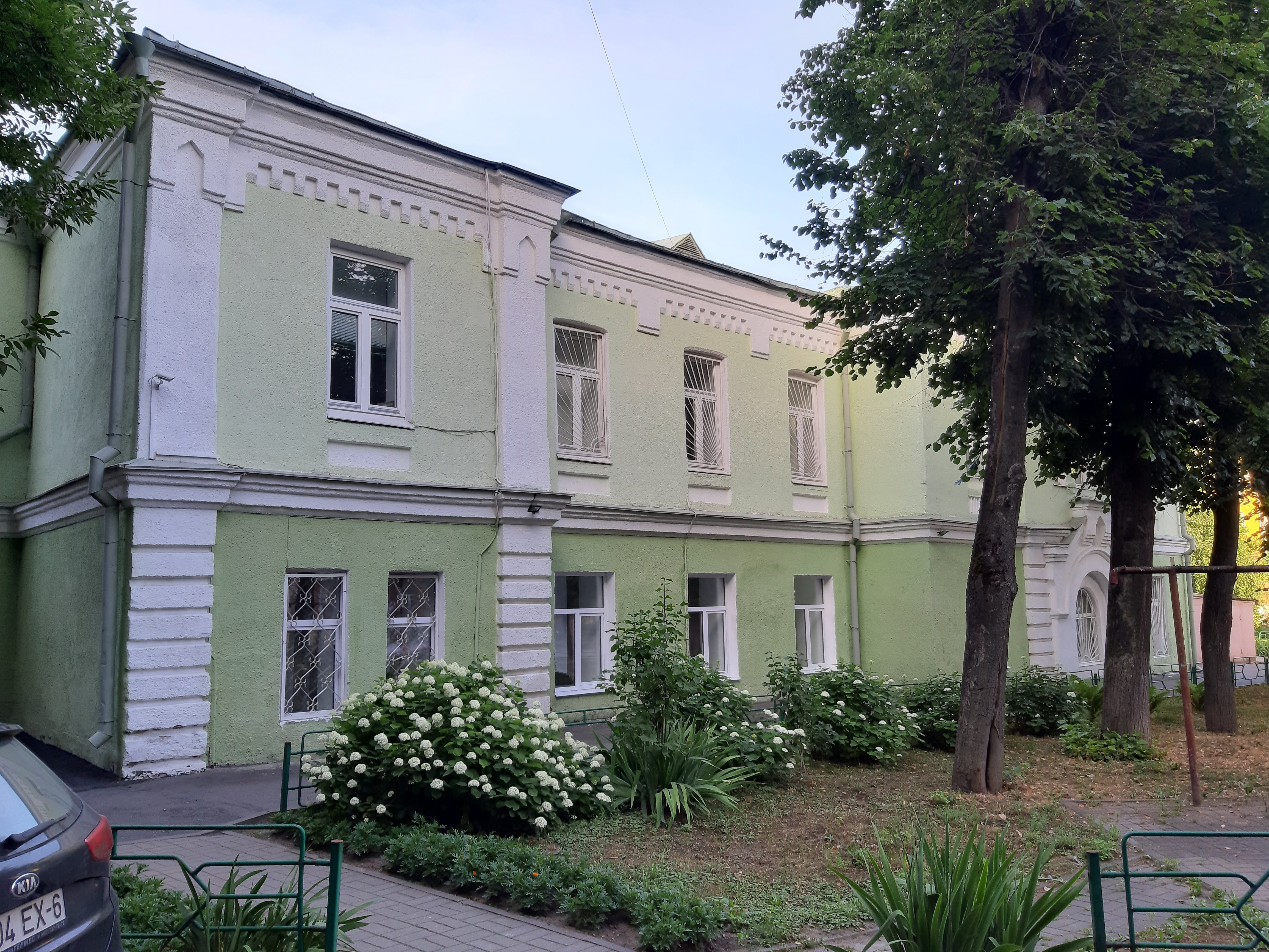 Магілёў. Між вуліцай Ленінскай і бульварам Леніна